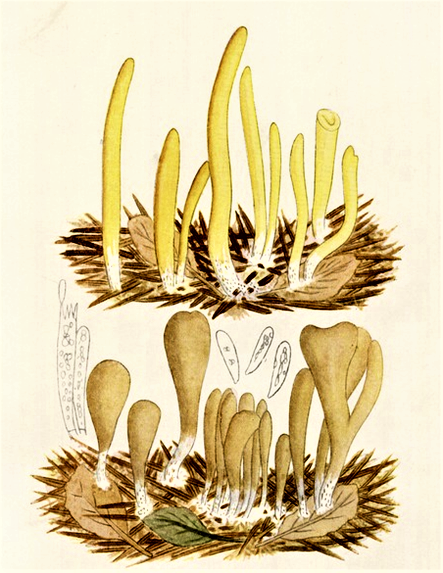 Giacomo Bresadola: Clavaria ligula (Jacob Christian Schäffer (1774), heute Clavariadelphus ligula (Schaeff.) Donk (1933)